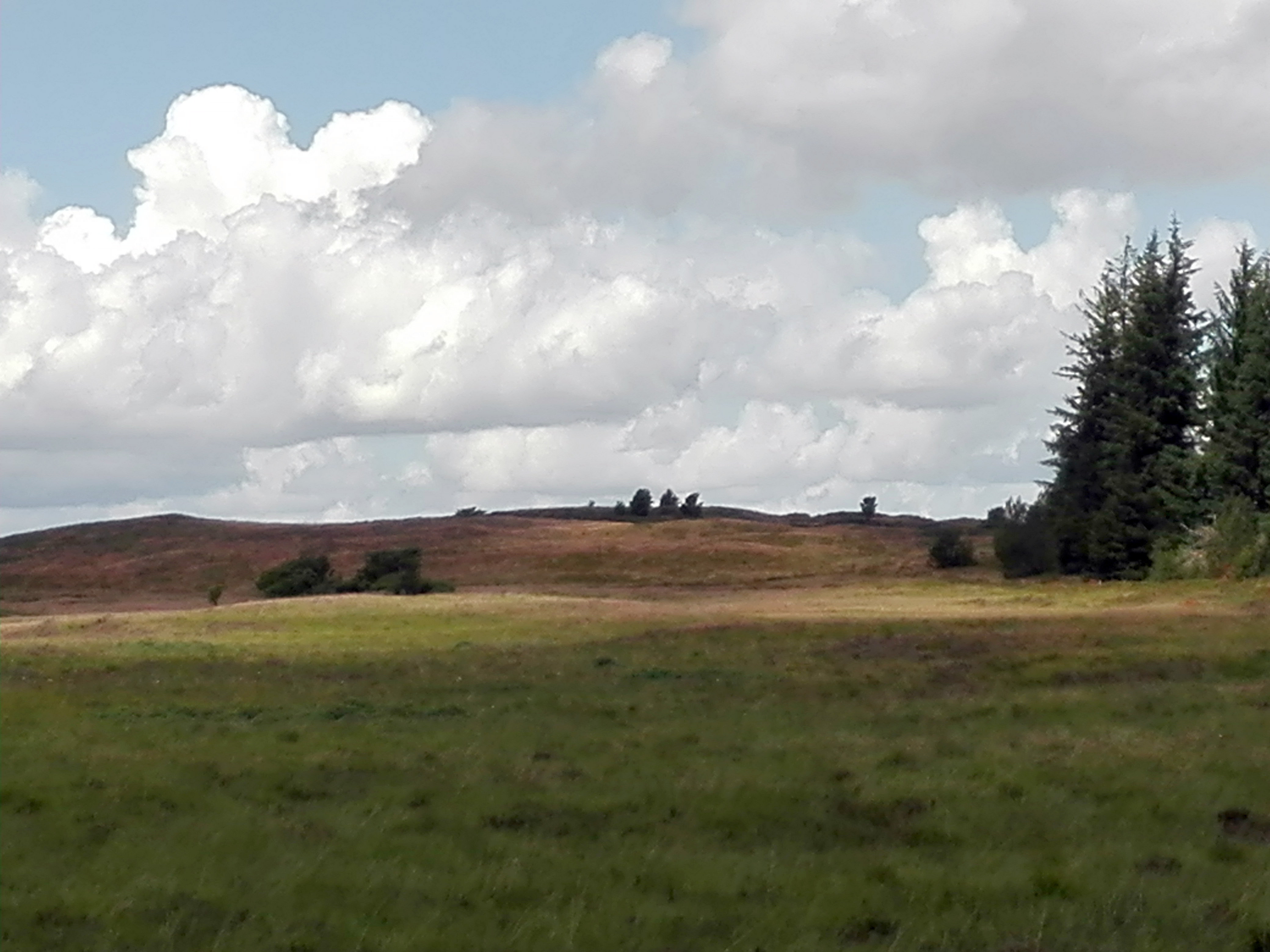 Sepstrup Sande mellem Sepstrup og Hjøllund